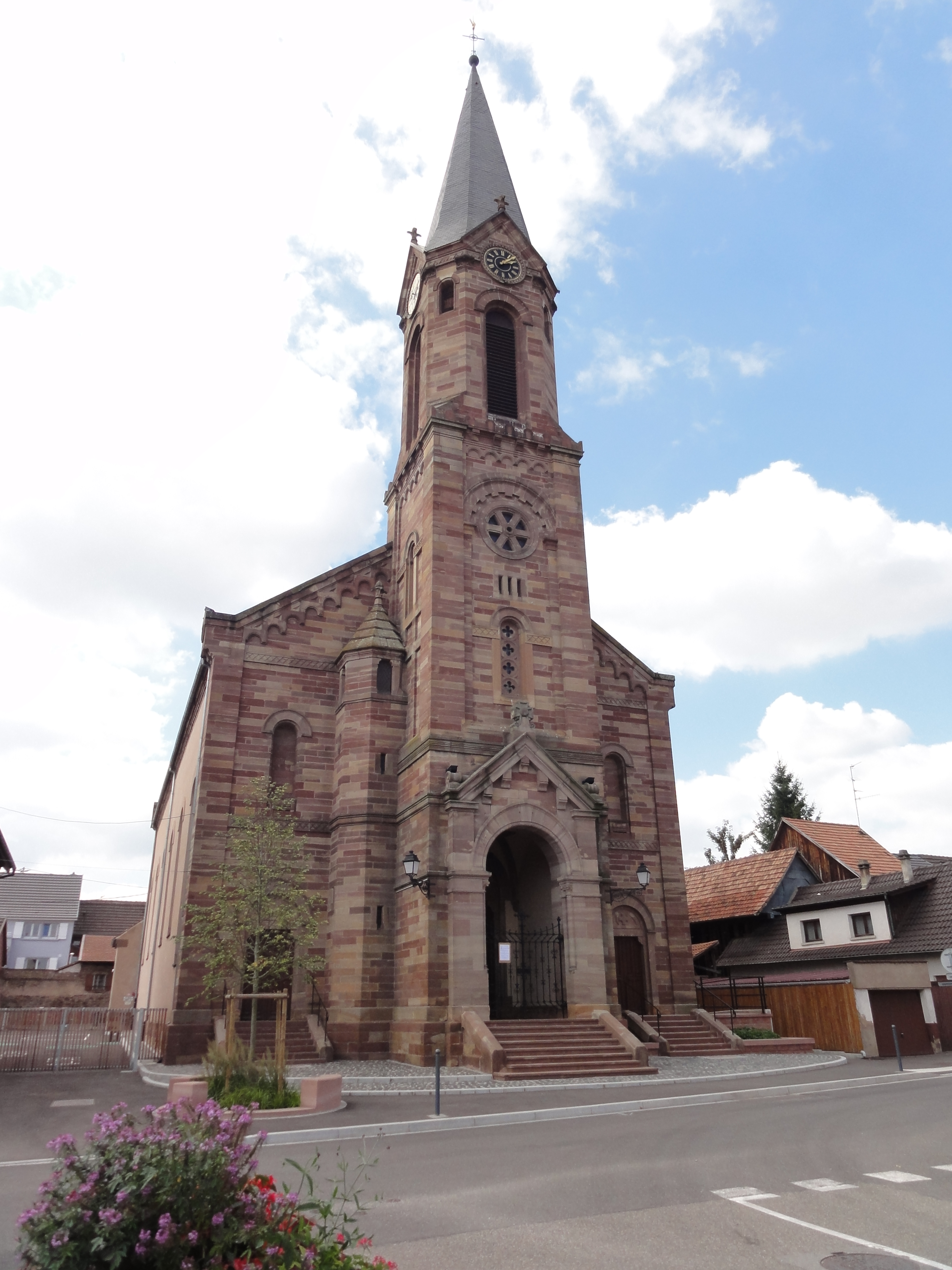 Alsace, Bas-Rhin, Église Saint-Alexis de Griesheim-près-Molsheim (IA00075530).